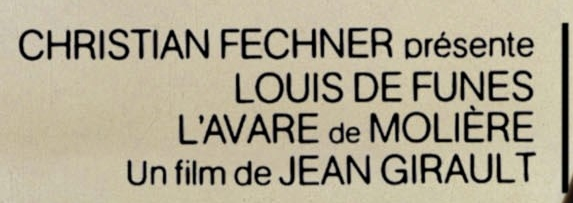 Extrait de l'affiche du film L'Avare (1980).